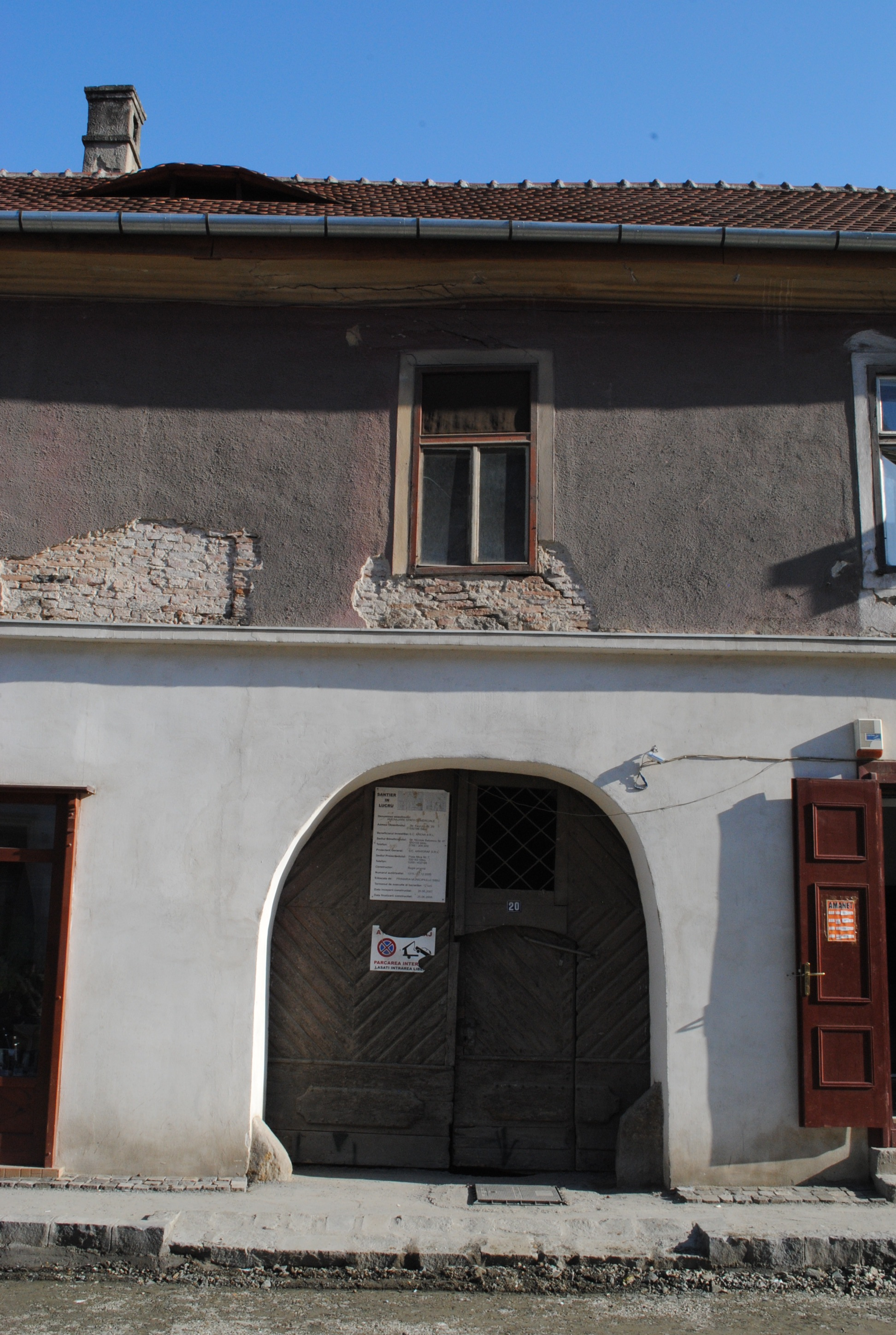 Casă, sec. XV - XVI, sec. XVIII